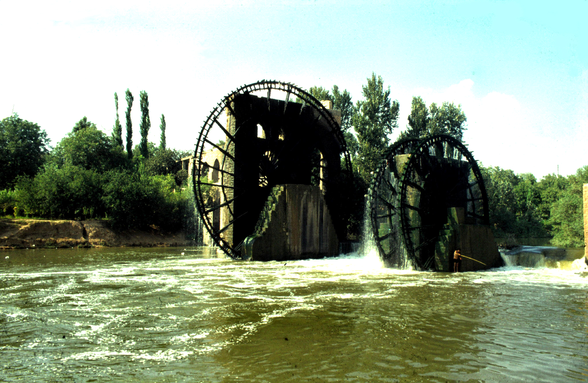 Les trois norias de Hama (Syrie), il y a maintenant des cafés avec terrasses sur les bords de l'Oronte, à l'époque c'était encore la campagne. Photo prise en 1980 avant les massacres de 1982 par Michel Benoist